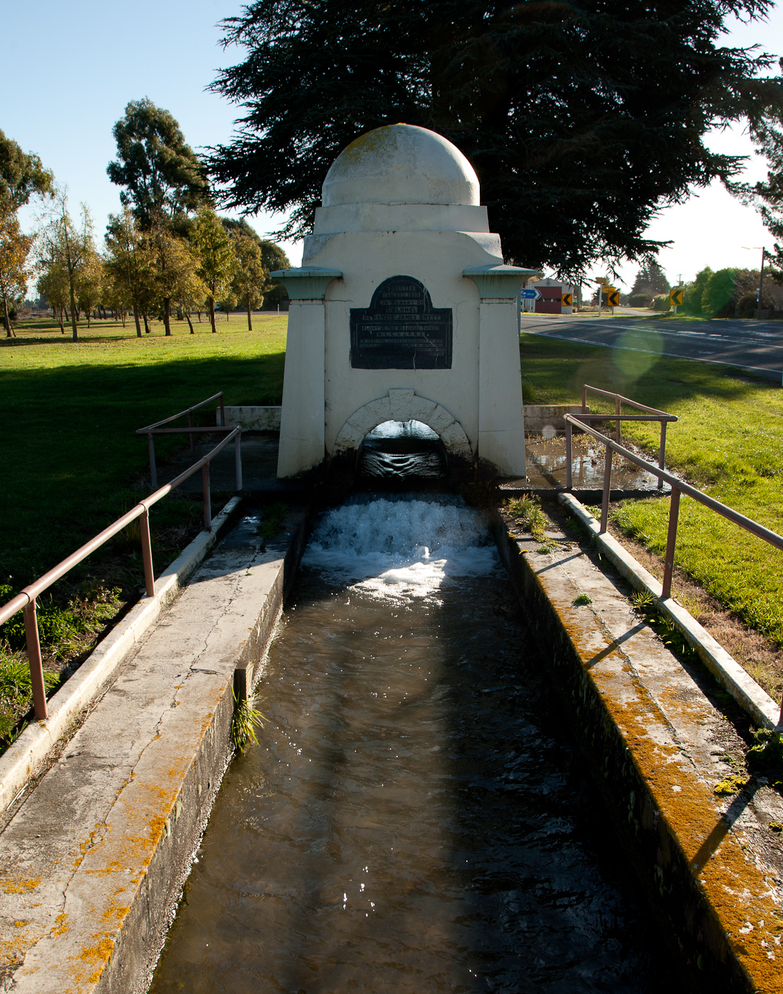 De Renzie Brett memorial in Kirwee